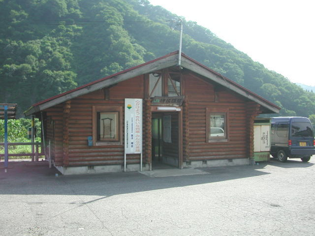 Isaryō Station, Oguni, Yamagata, Japan